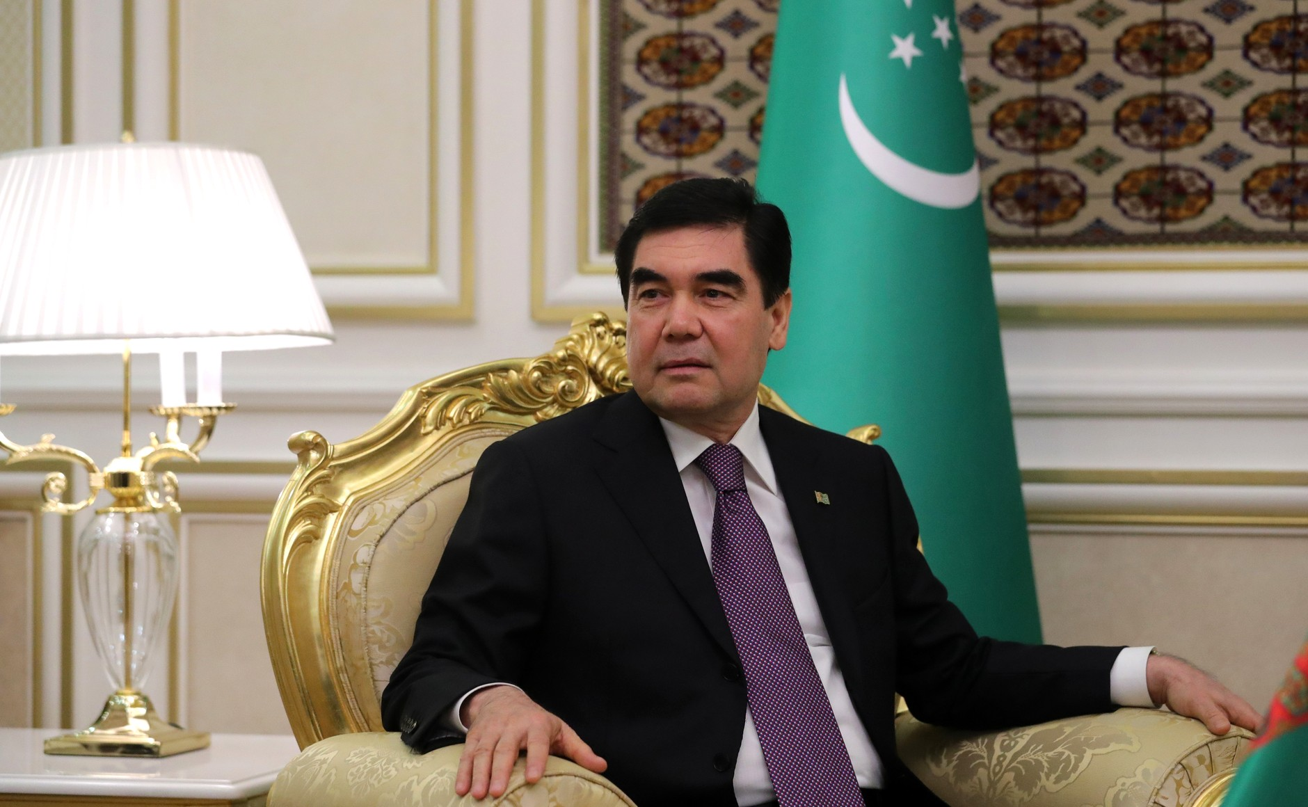 Президент Туркменистана Гурбангулы Бердымухамедов во время встречи с Президентом России Владимиром Путиным